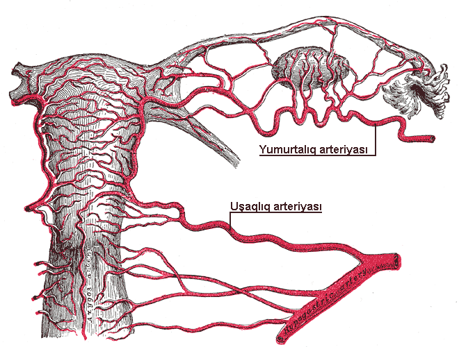 Yumurtalıq və uşaqlıq arteriyaları